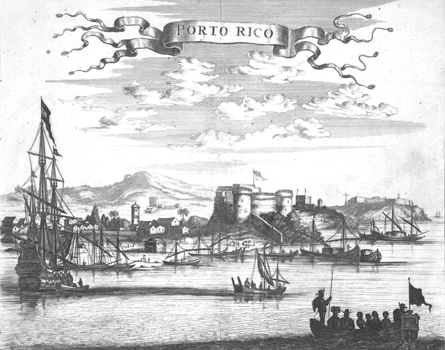 Porto Rico